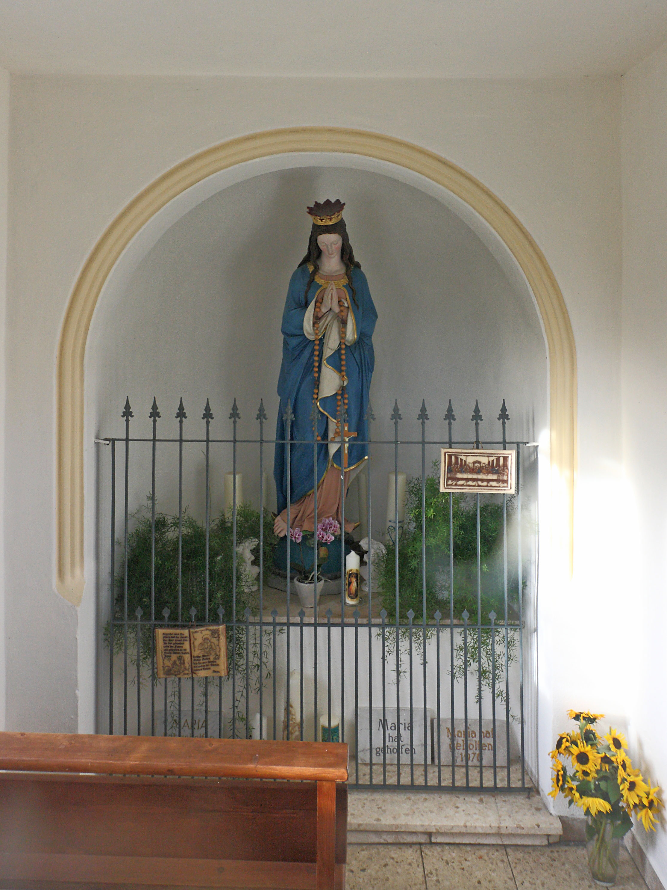 Neugotische Holzfigur der Immaculata in der Kapelle